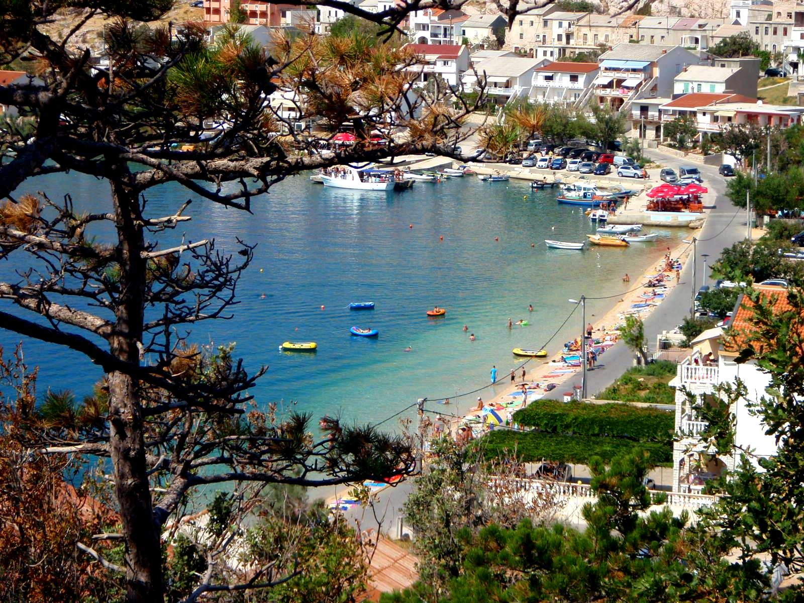 Matajna, Pag